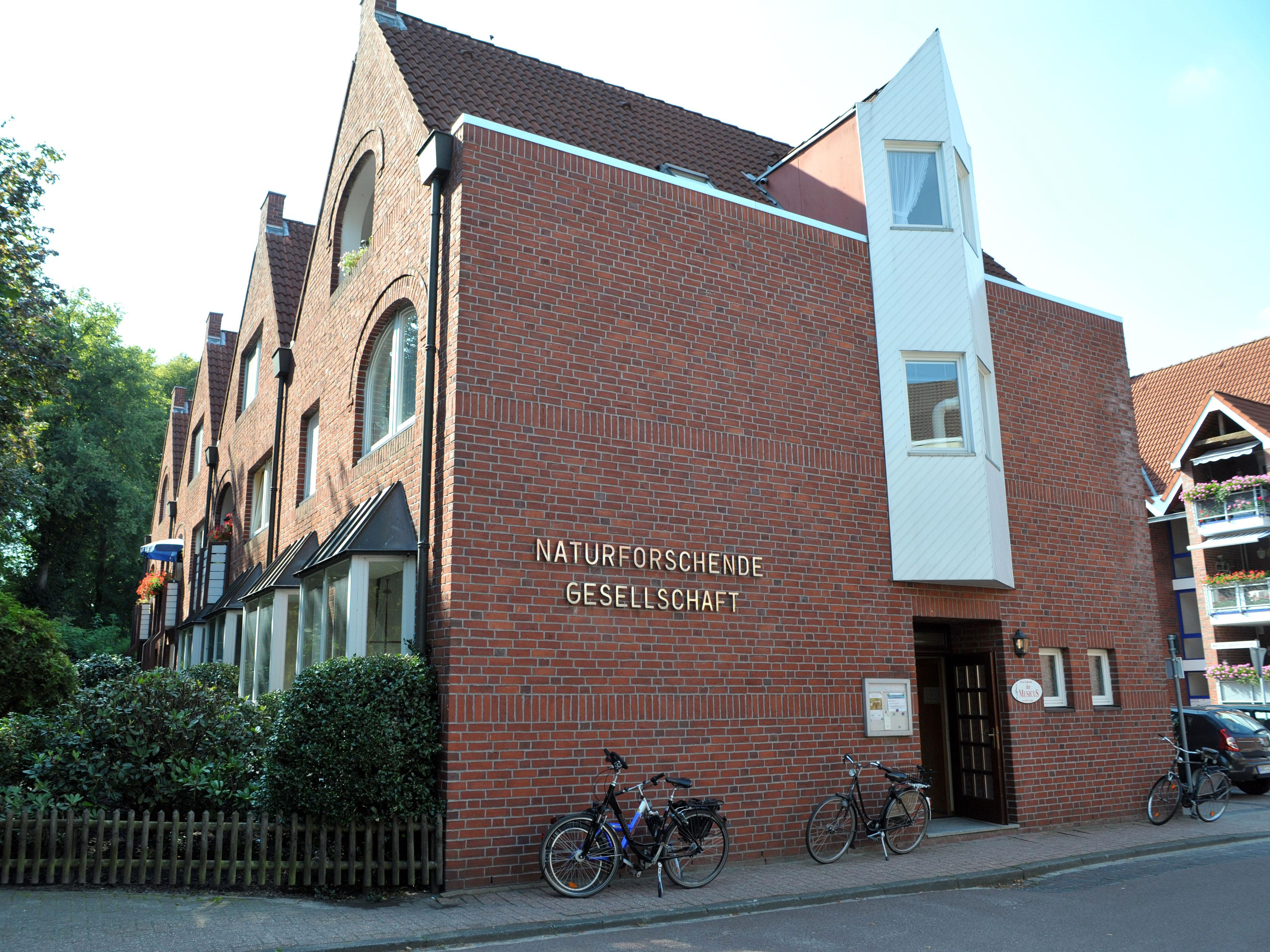 Sammlungsgebäude der NfG